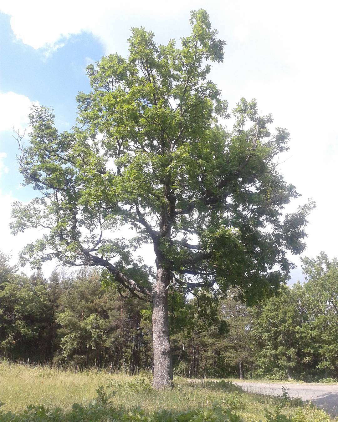 Chêne, montagne de Lure